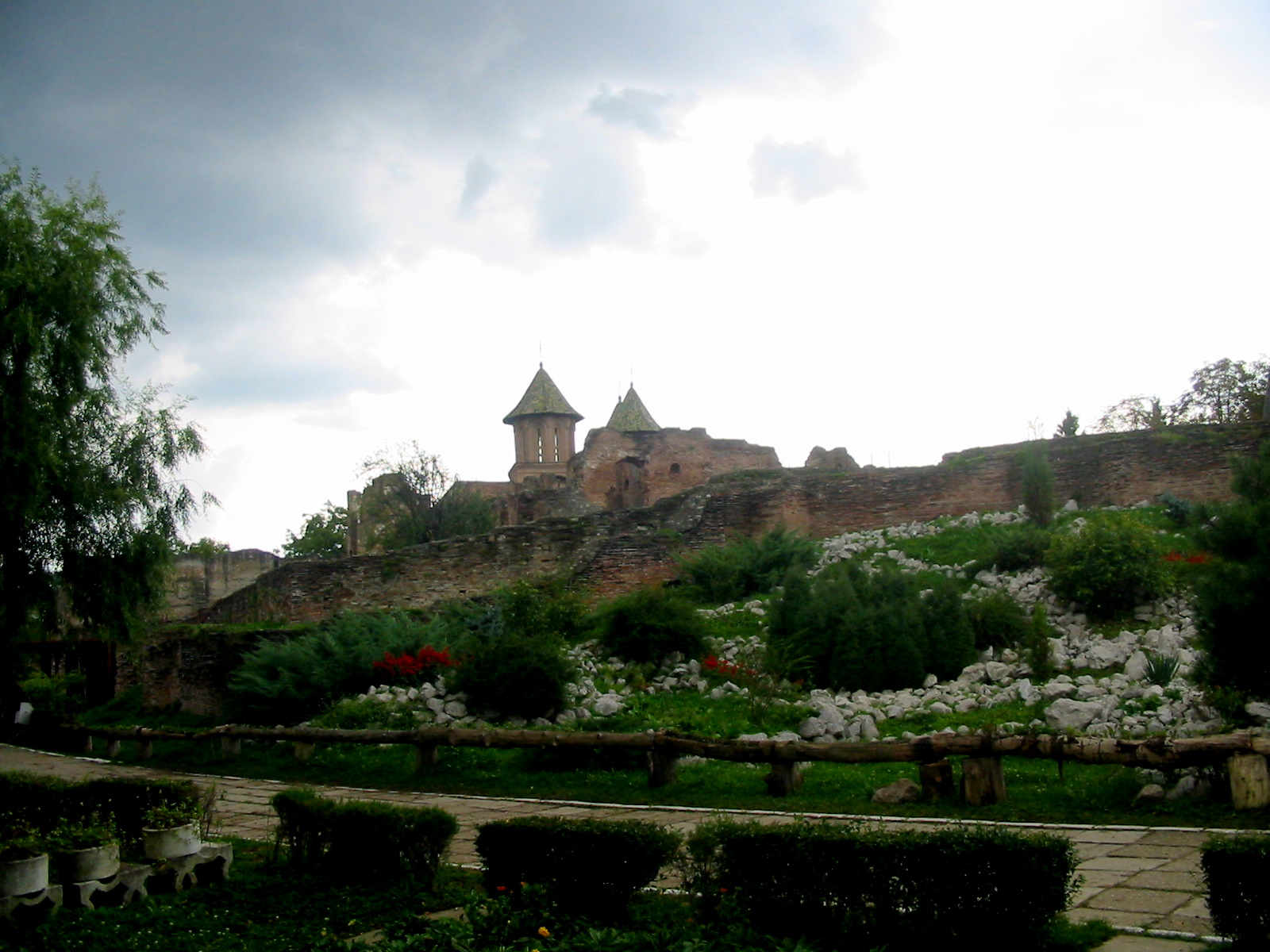 Curtea Domnească IMG 0374